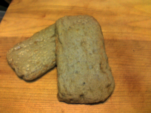 Zyako ten